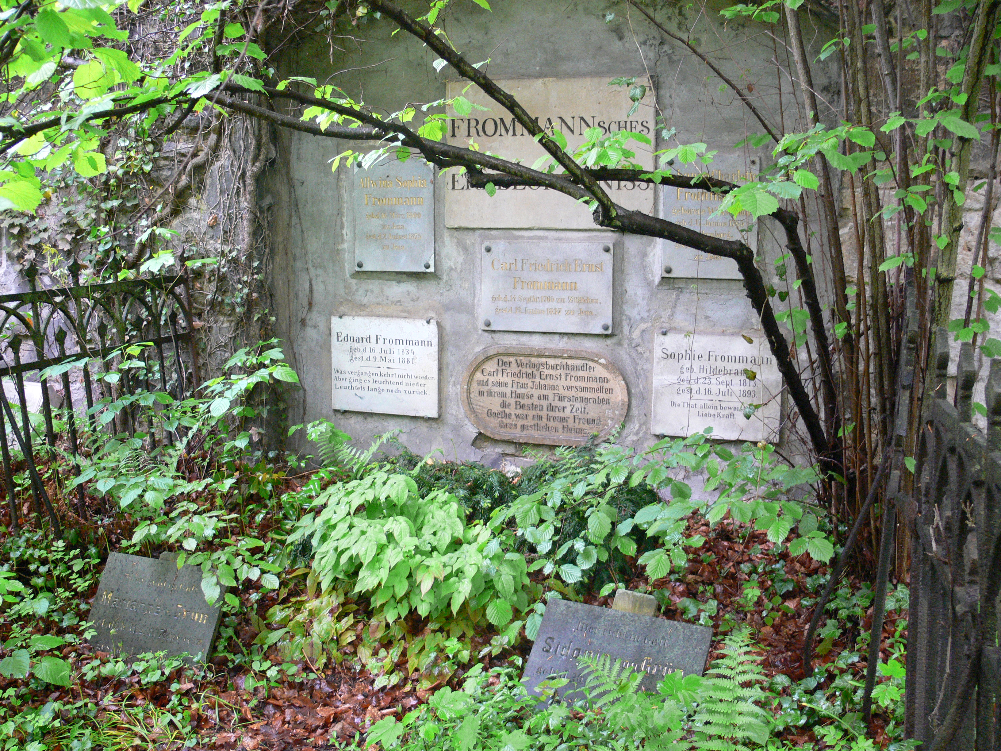 Jena, Johannisfriedhof Grabmal des Buchhändler Carl Friedrich Ernst Frommann und Familie